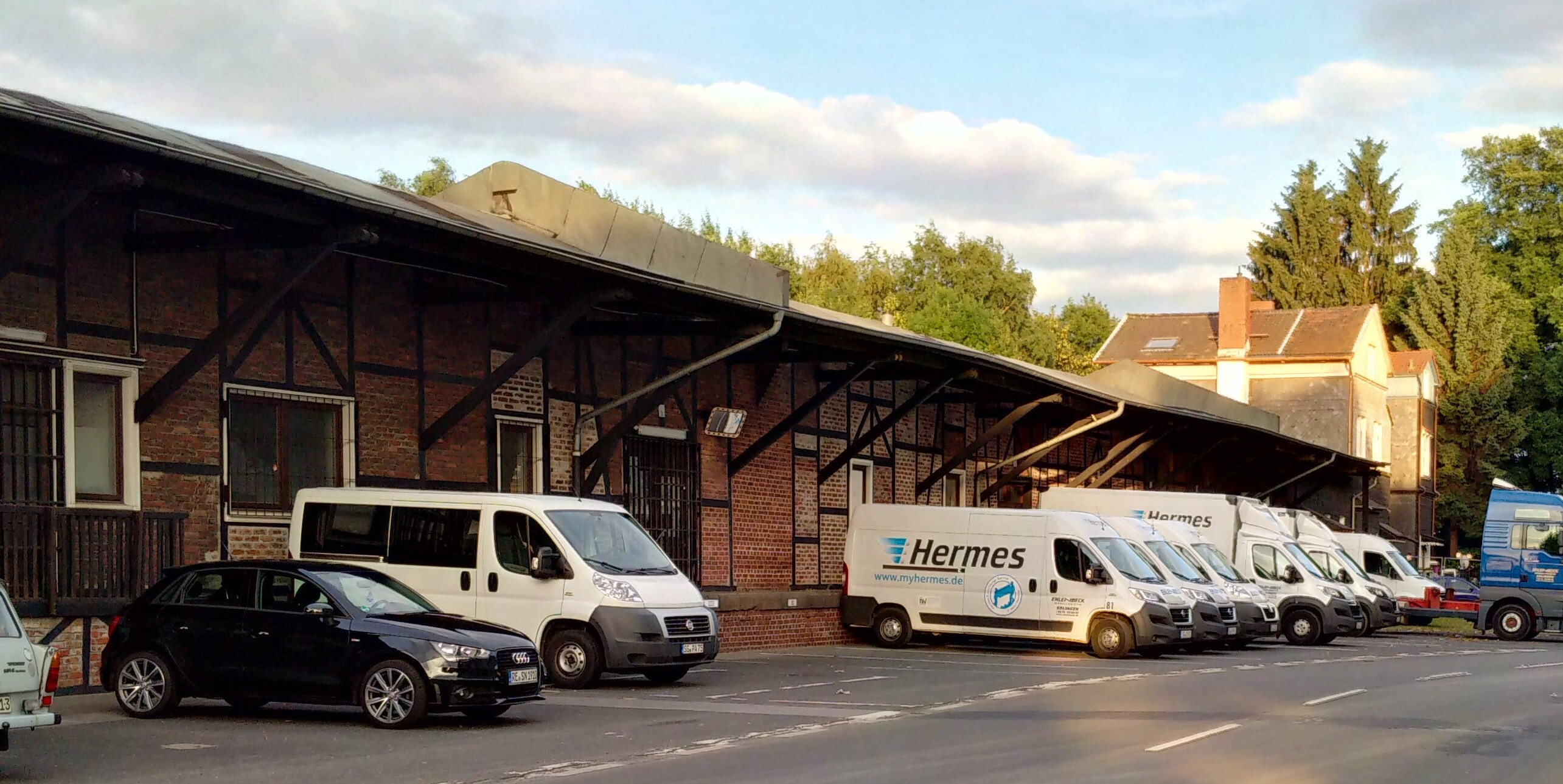 Güterhallen des ehemaligen Walder Bahnhofs, aufgenommen im Sommer 2016